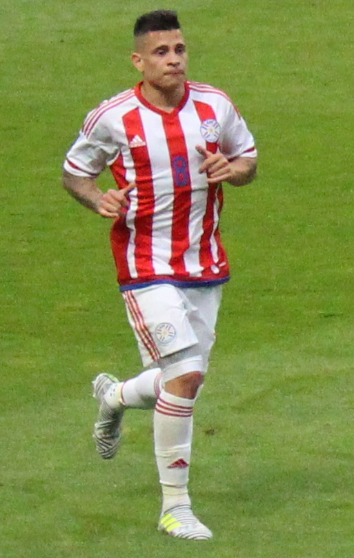 Juan Iturbe sur le terrain contre la France (match amical, 2 juin 2017) au Roazhon Park